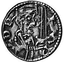 Harald 3. Hen lod sig på sine sjællandske mønter afbilde med et draget sværd. Han er den første danske konge, der bruger dette motiv til at understrege sin magt. Mønten er præget i Roskilde. Den Kgl. Mønt- og Medaillesamling. Gengivet i 1:1.